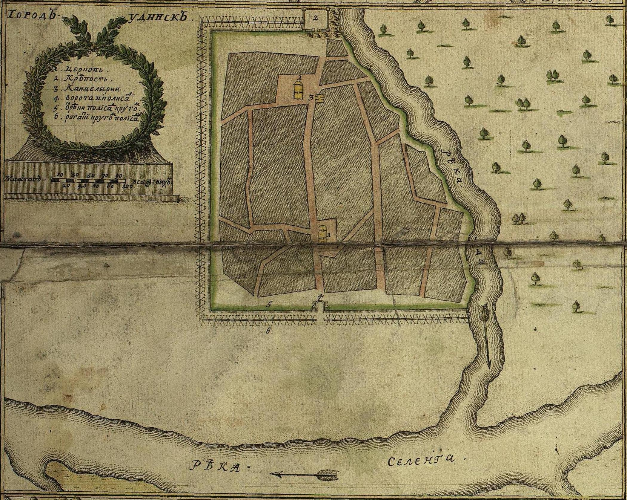 План города Удинска (1730 год)